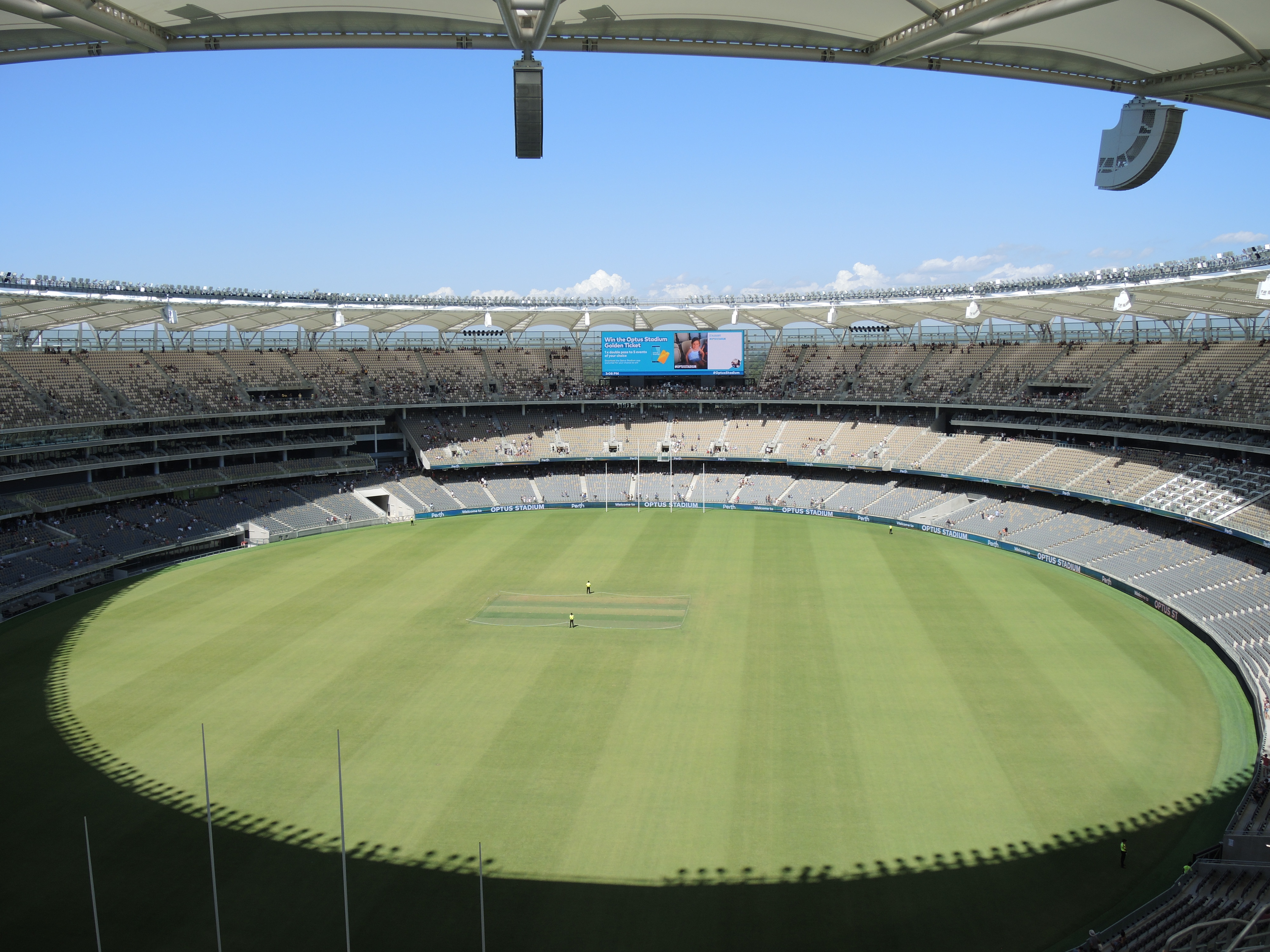 Perth Stadium open day.